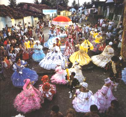 Maracatu é uma manifestação cultural da música folclórica afro-brasileira, no estado de Pernambuco. É formada por uma percussão que acompanha um cortejo real. Como a maioria das manifestações populares do Brasil, é uma mistura das culturas indígena, africana e européia. Surgiu em meados do século XVIII.